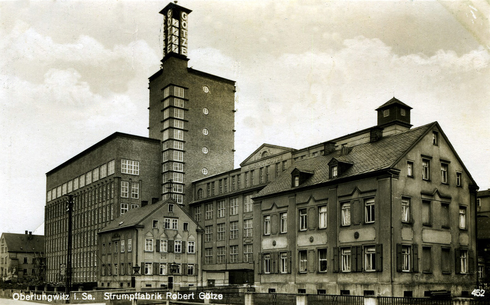 Strumpffabrik Robert Götze (ROGO) in Oberlungwitz (Sachsen), Architekt: Friedrich Wagner-Poltrock, 1929